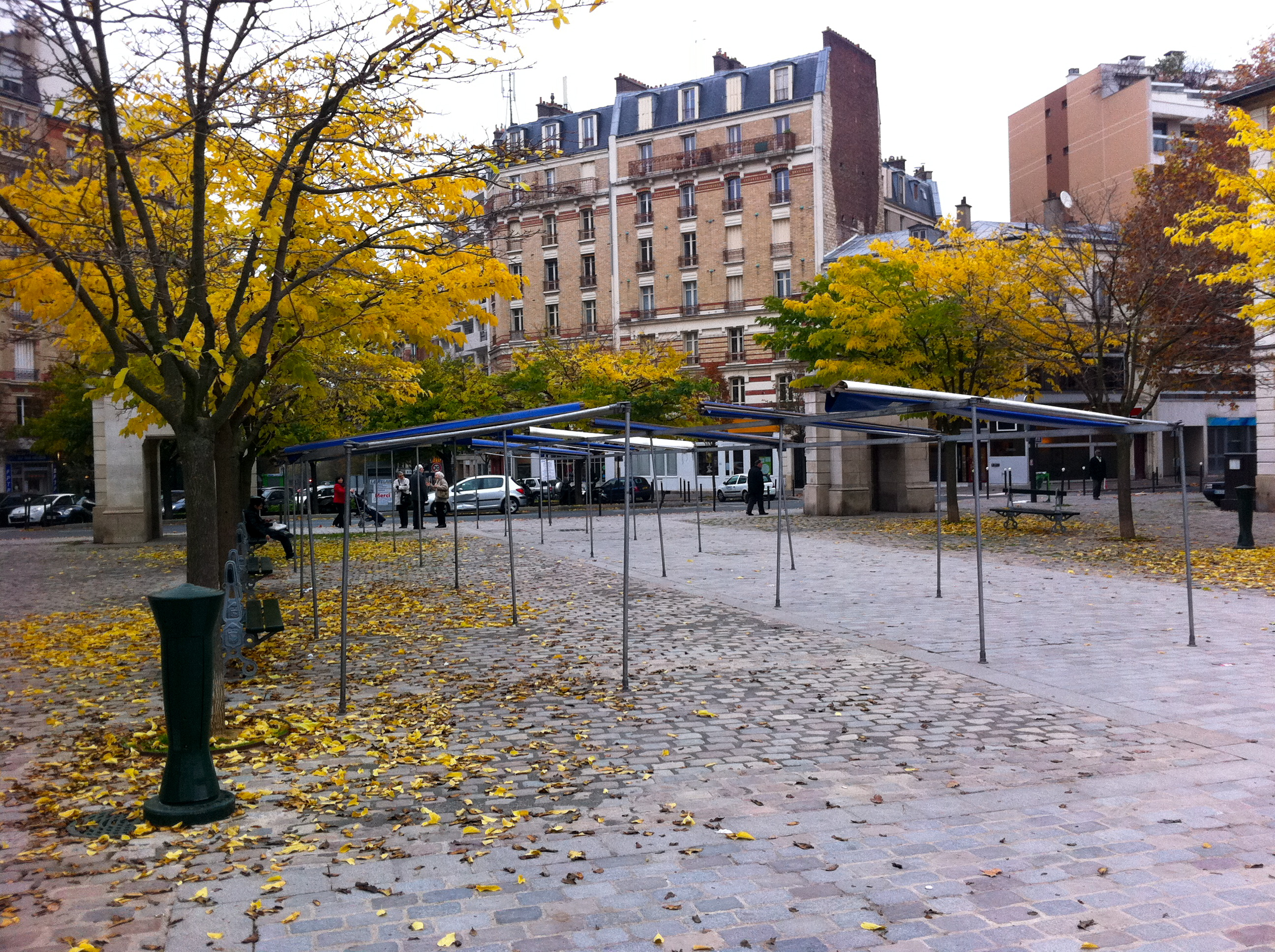 Place Jacques-Marette.